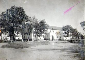 Стара школа